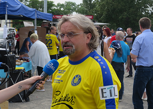 Heiko Scholz